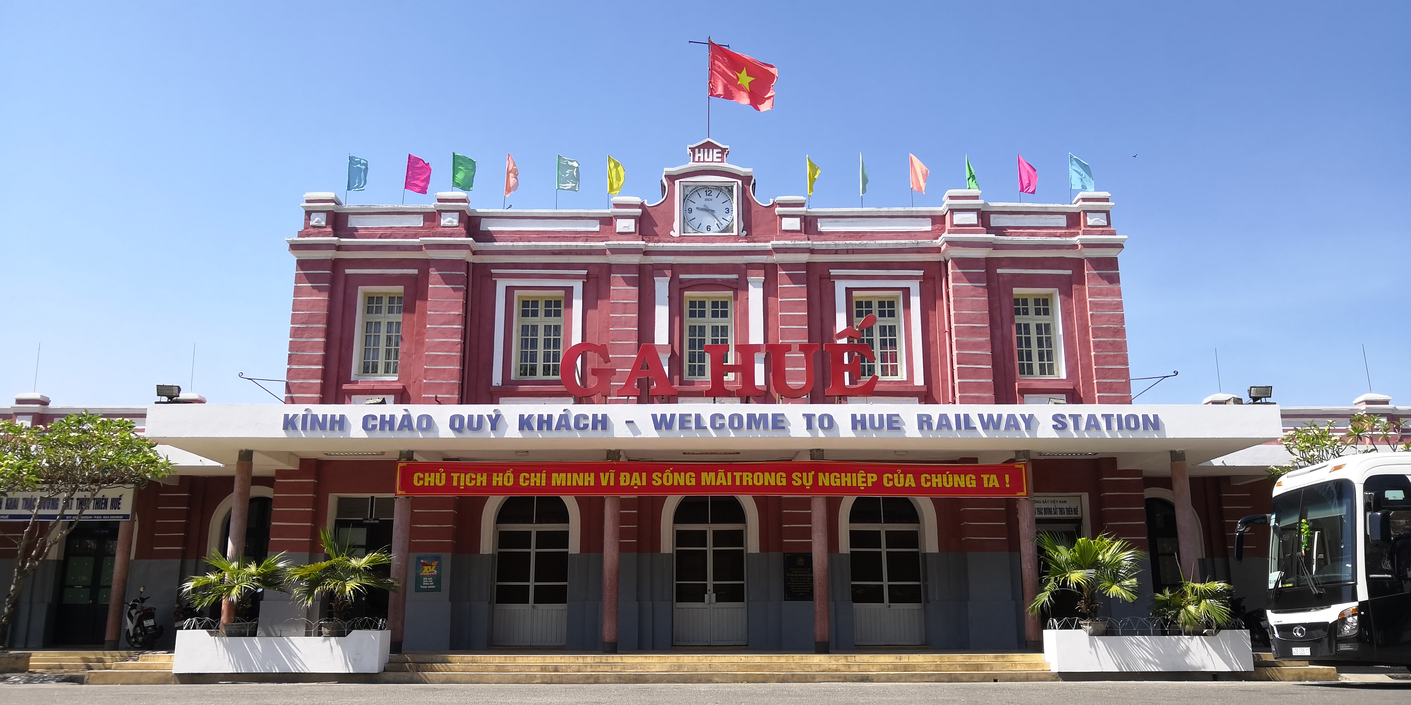 越南铁路南北线顺化站。拍摄于2018年5月30日。